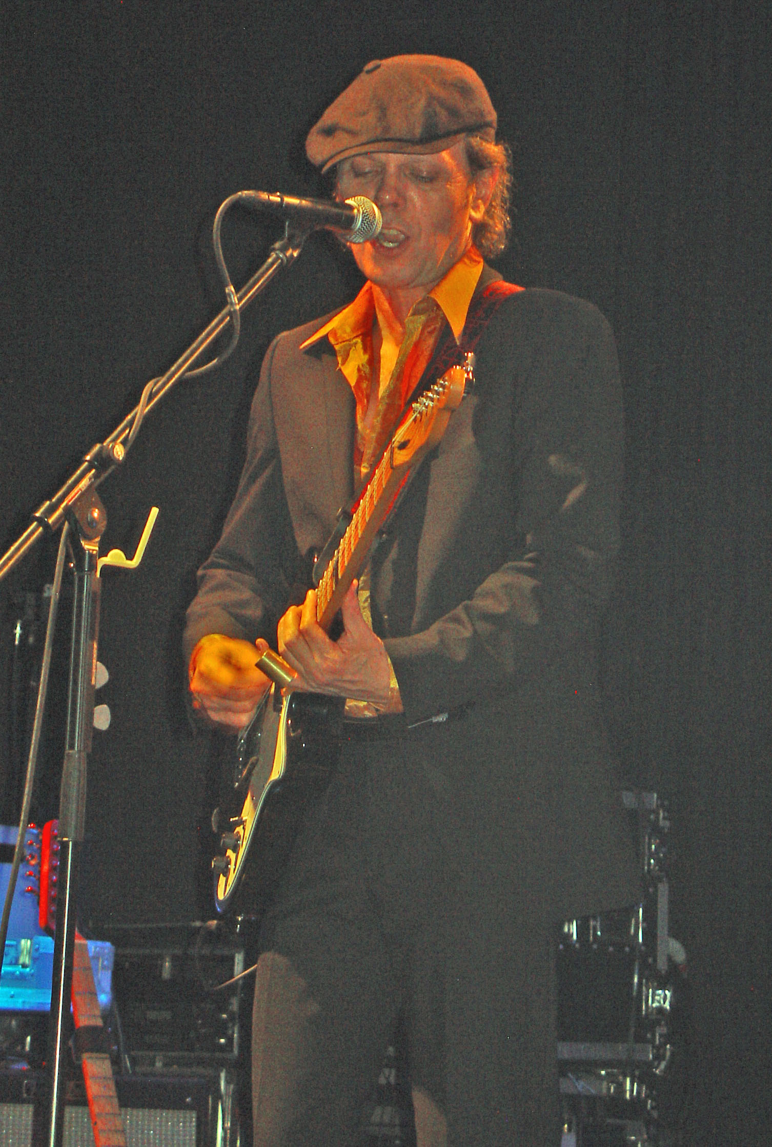 Jürgen Ehle beim Pankow Konzert 2011 im alten Schlachthof in Dresden